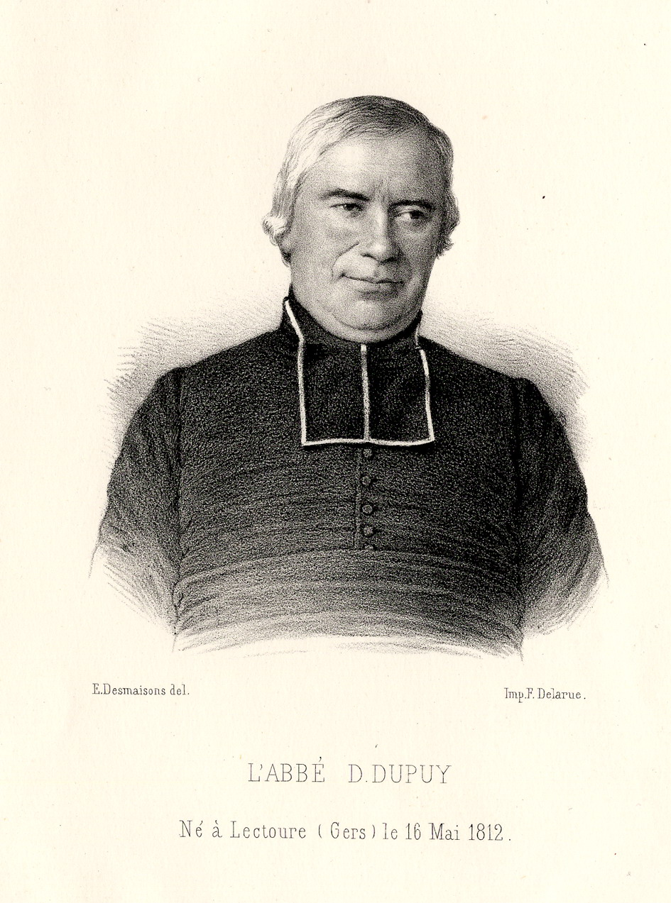 Portrait de l'abbé Dupuy publié par les bulletins de la société malacologique